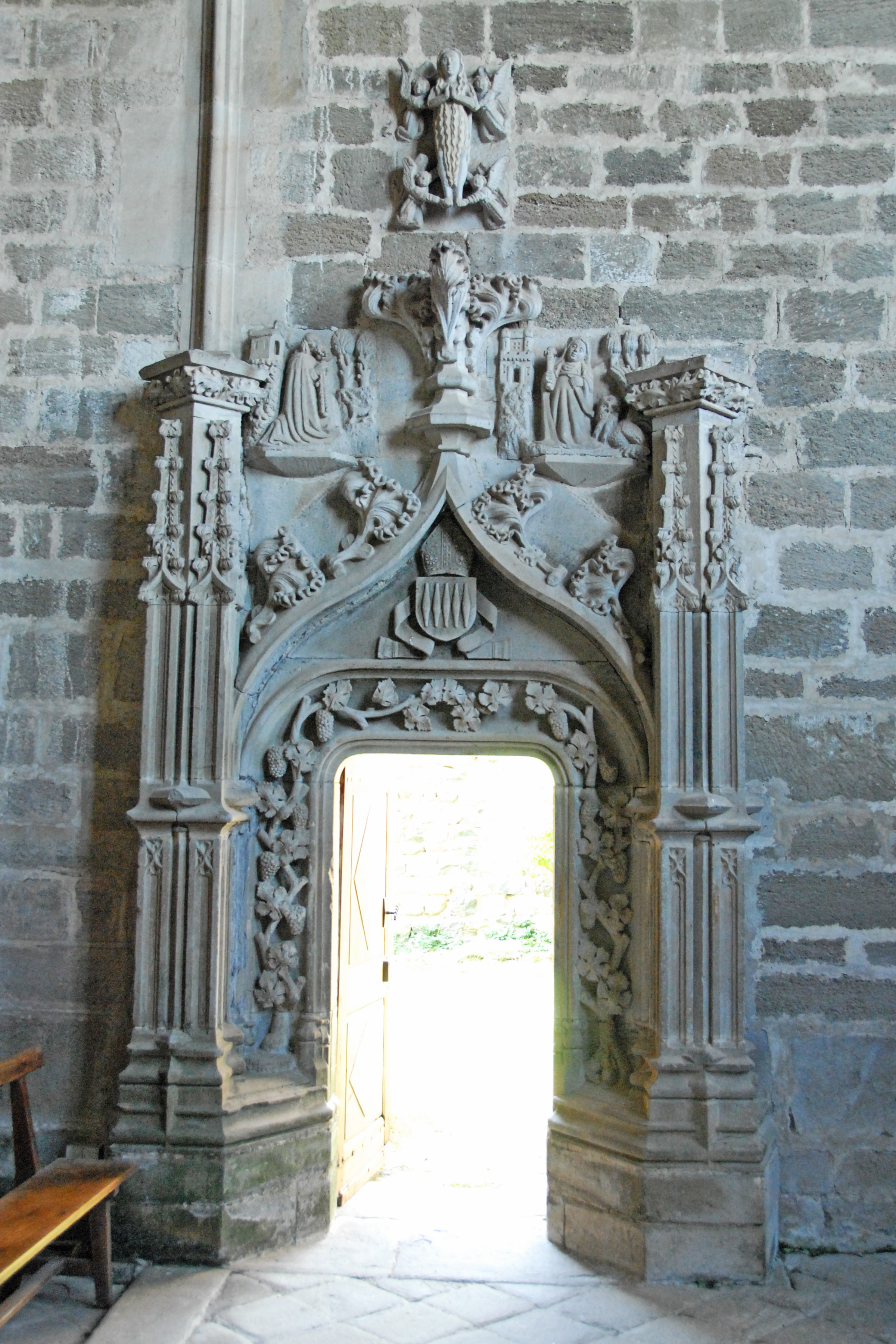 Nordportal Westwand